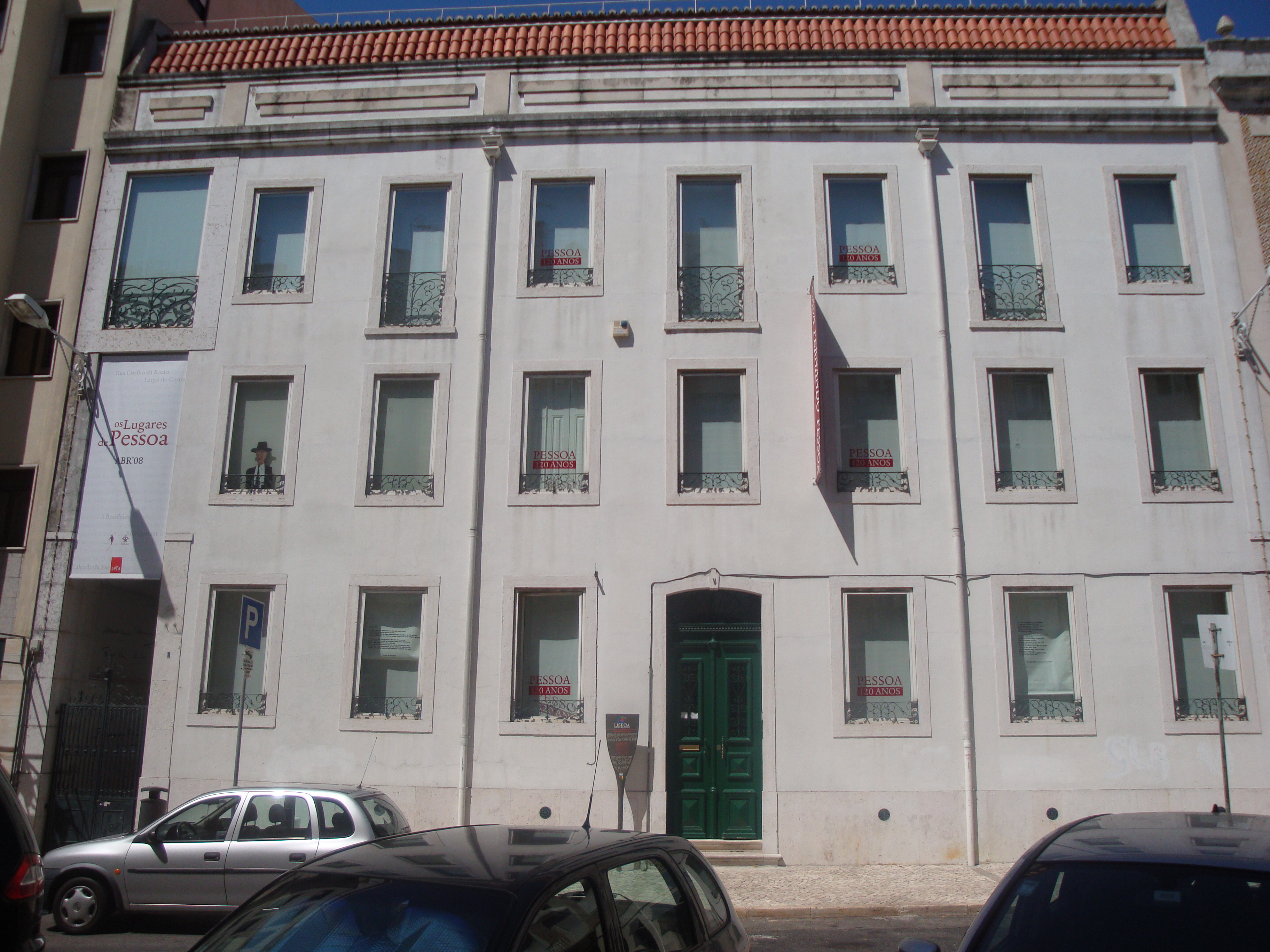 Prédio da última residência do poeta Fernando Pessoa